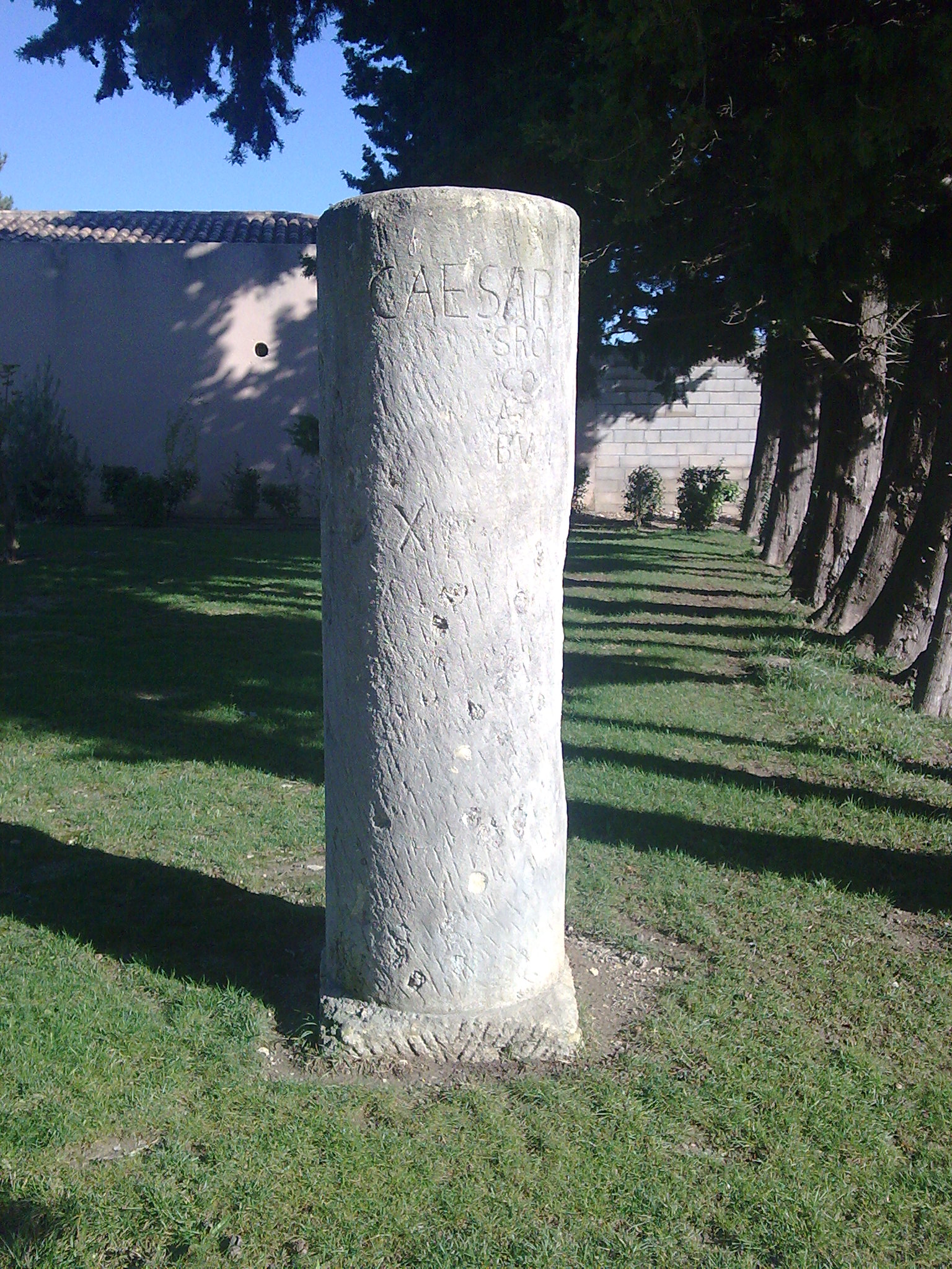 Réplique de la borne milliaire dédicacée à l'empereur Auguste, en l'an 3 av. J.-C., et trouvée au mas de Sabran (dit aussi mas de Chabran, à environ 1 km au Sud de Maussane, sur le « grand camin »). Cette copie est visible dans le parc André-Blanc (espace Agora Alpilles) de Maussane. L'original, dans la collection Trabaud en 1876, a ensuite été versé dans la collection lapidaire du musée Borély à Marseille (aujourd'hui au musée d’archéologie méditerranéenne ?).Le texte de CIL XVII2, 00064 sur Epigraphik-Datenbank Clauss-Slaby.Cf. Gerold Walser, CIL XVII-2, 1986, inscr. 64 p. 20 (en ligne).Nota : Quelques confusions avec la borne milliaire de la Calanque sont à éclaircir (mentions anciennes, appelation Long Terme, lieu de découverte).